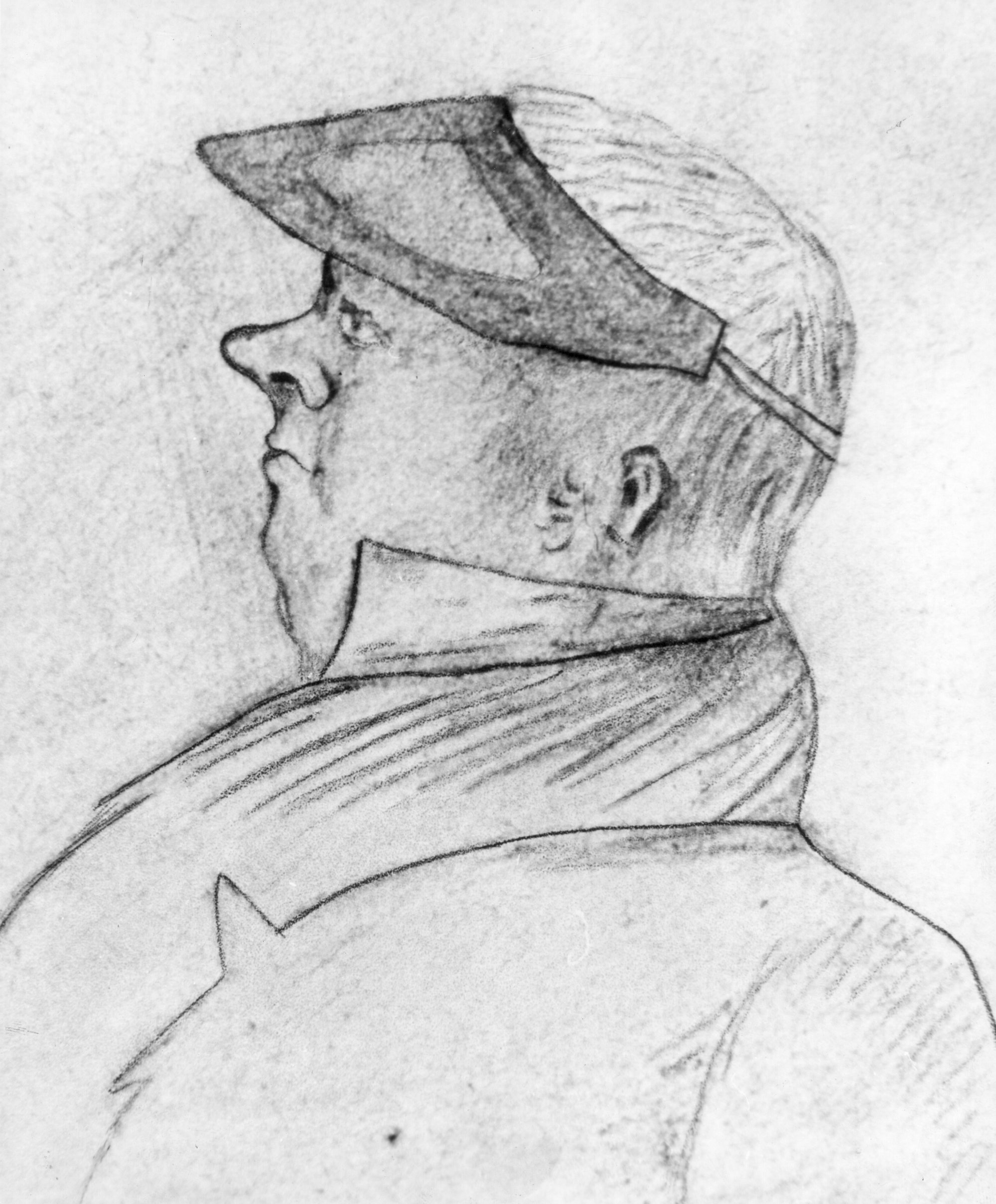 Rektor på Latinskolen Skien, Knut Ramshart Ørn, tegning med teksten Ecce Canutum! Norsk portrettarkiv, Riksantikvaren